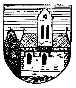 Wappen von Carlsmarkt (Karlsmarkt) in Niederschlesien um 1870 nach Clericus.